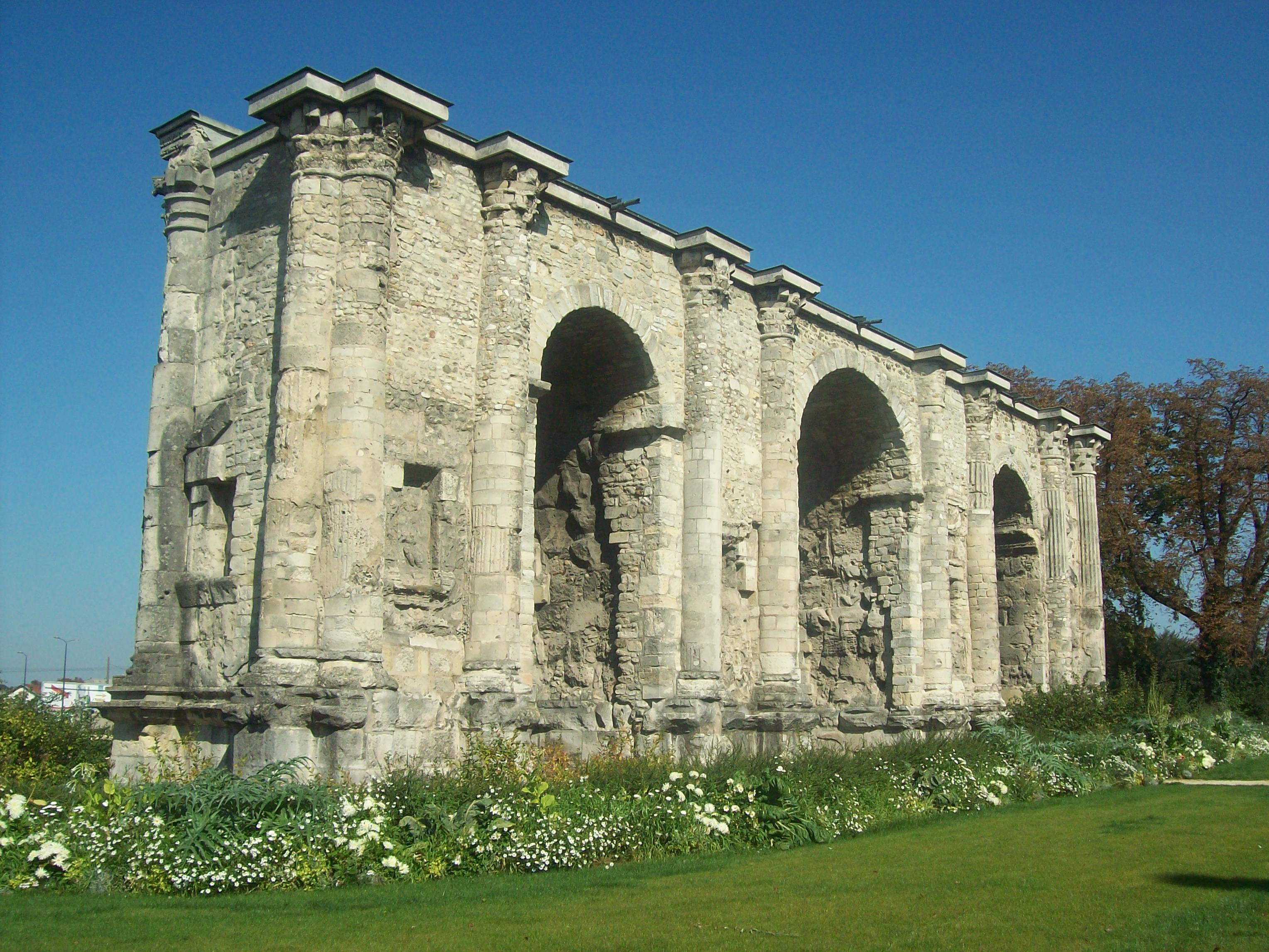 La Porte Mars — Reims, Champagne-Ardenne, France